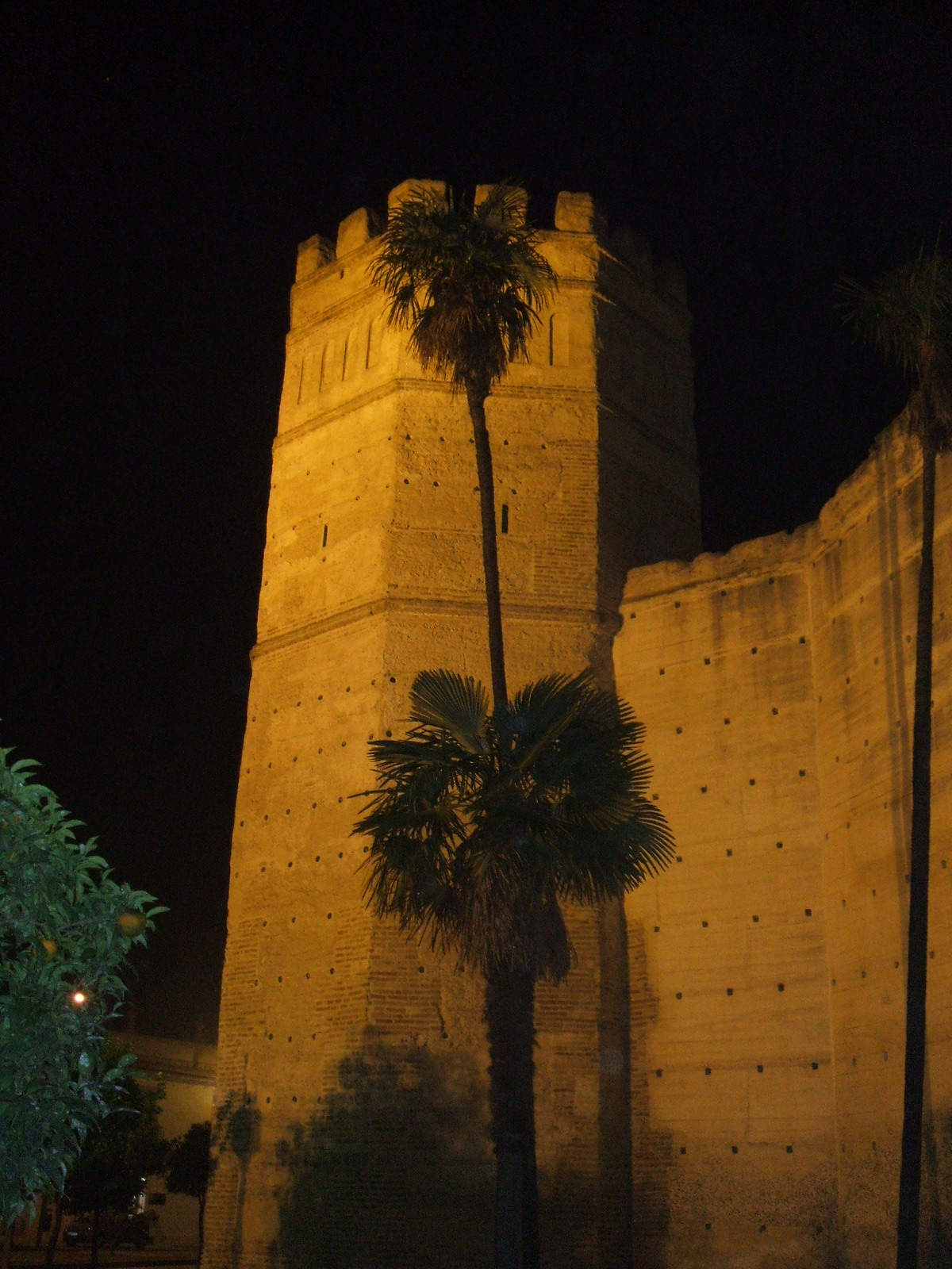 En Jerez de la Frontera (Cádiz) el Alcázar presenta una torre albarrana llamada "Torre Octógona", buen ejemplo de la arquitectura militar almohade.